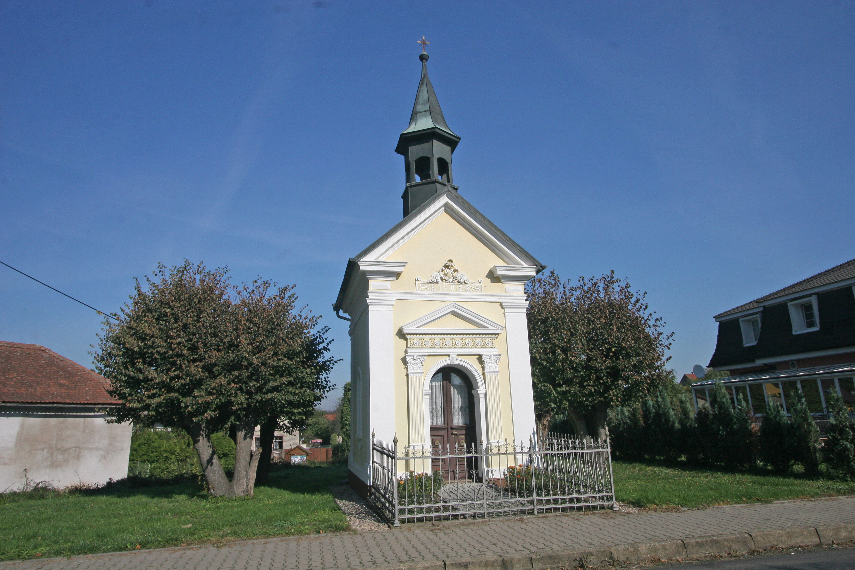 Veselí kaplička